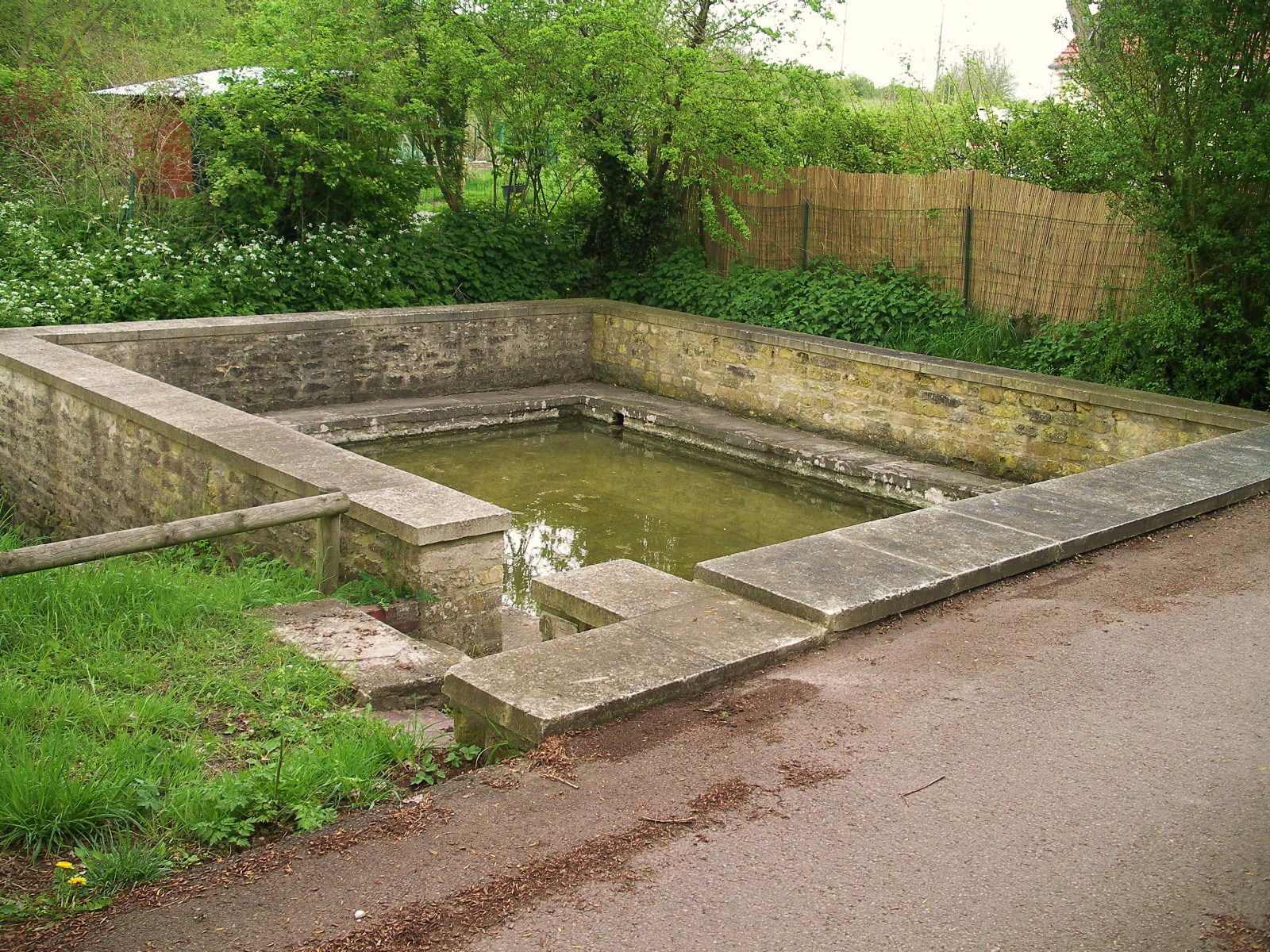 Lavoir de l'Ormelaie à Brouay (Calvados)